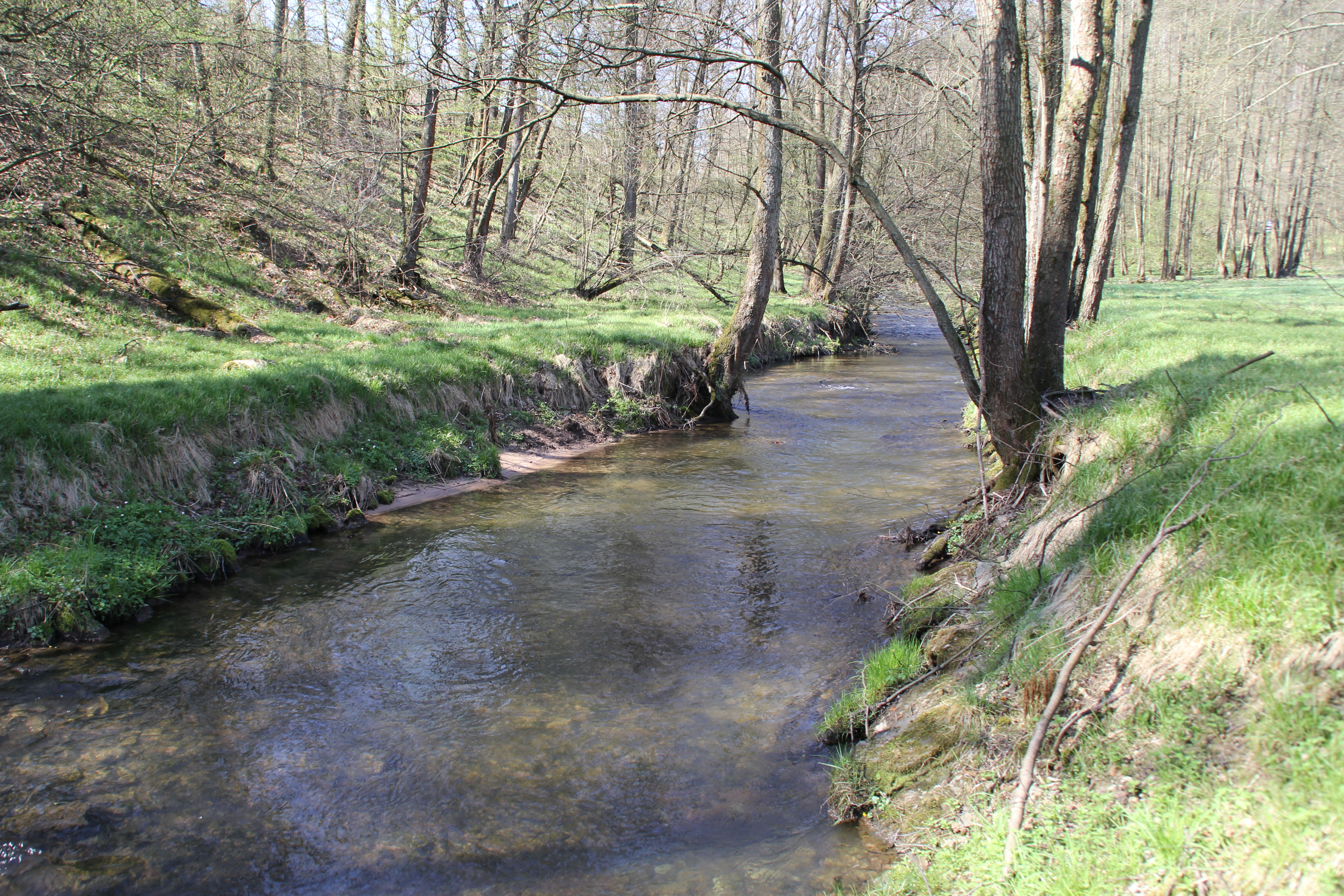 Der Lohrbach nordöstlich von Neuhütten